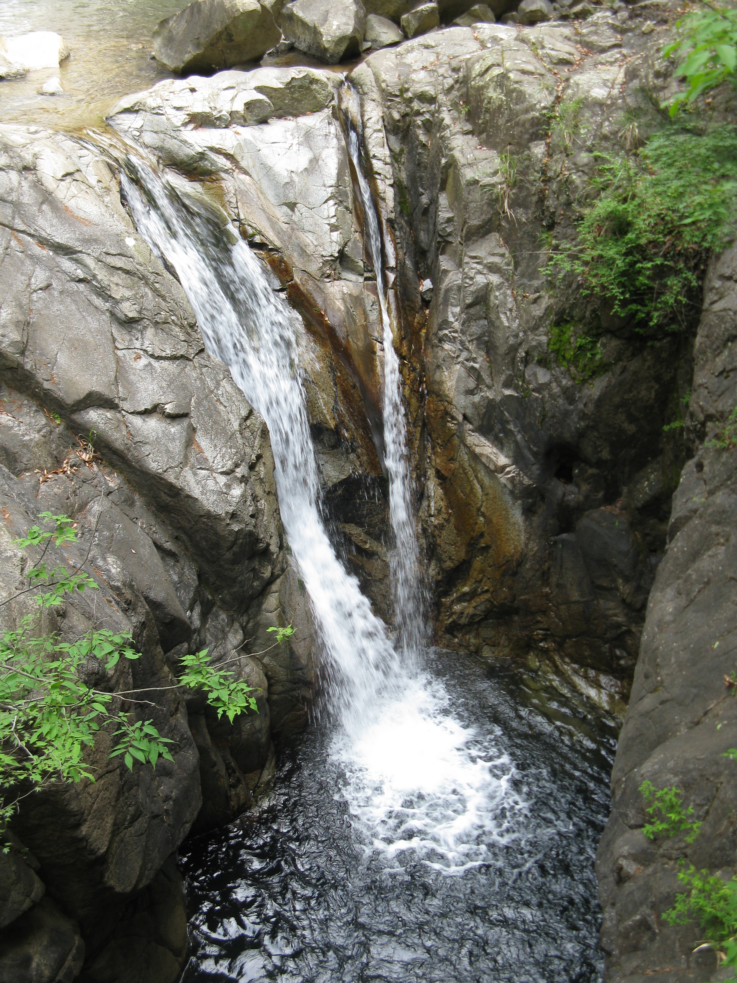 布引の滝・夫婦滝